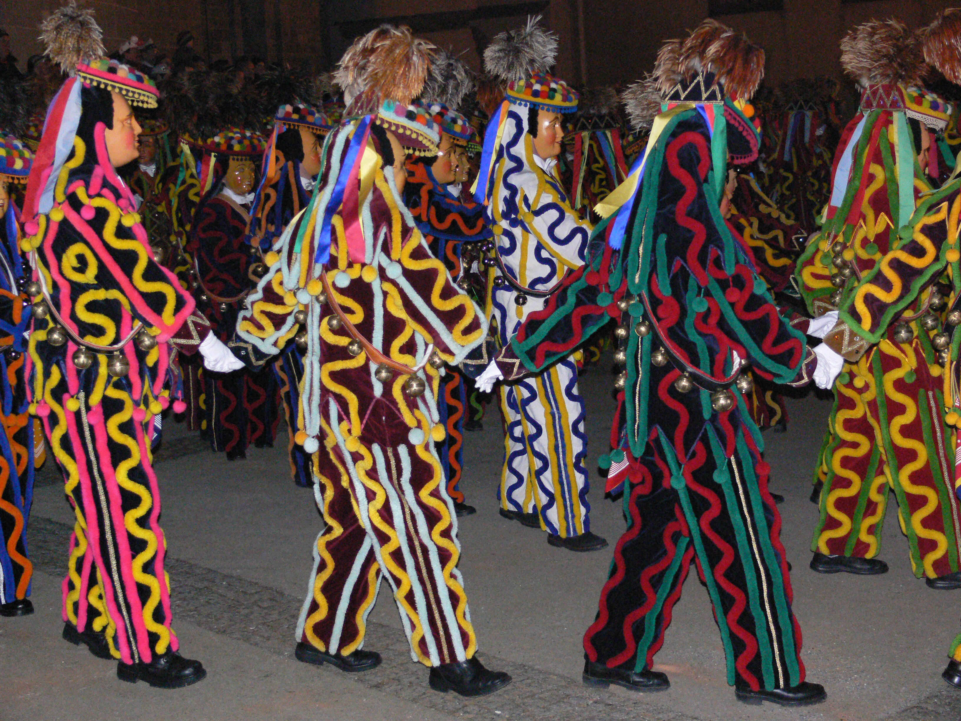 Narrentanz „Dr Bolones“ der Narrenzunft Schömberg beim VSAN-Landschaftstreffen 2006 auf dem Münsterplatz in Weingarten